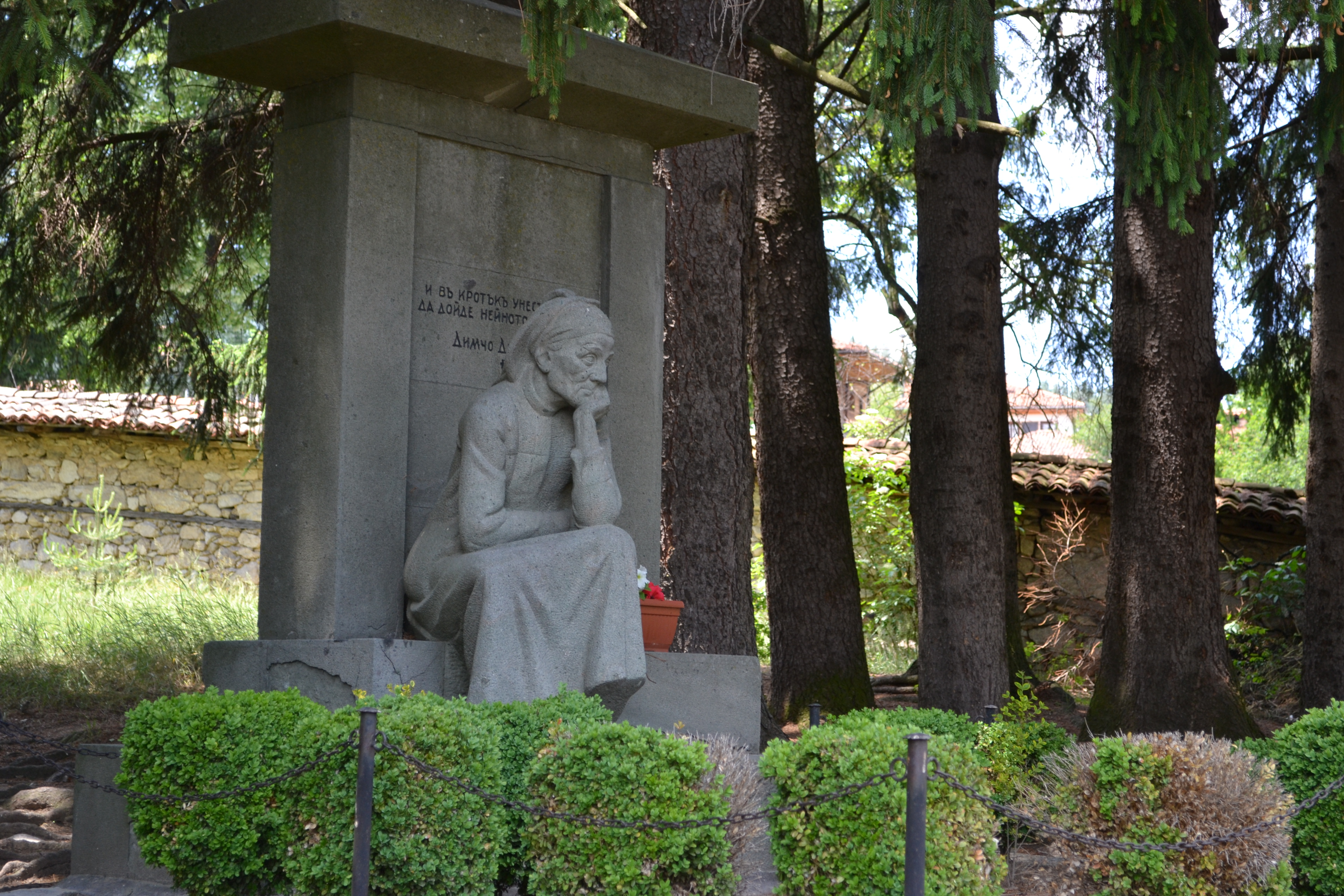 Майка от Иван Лазаров